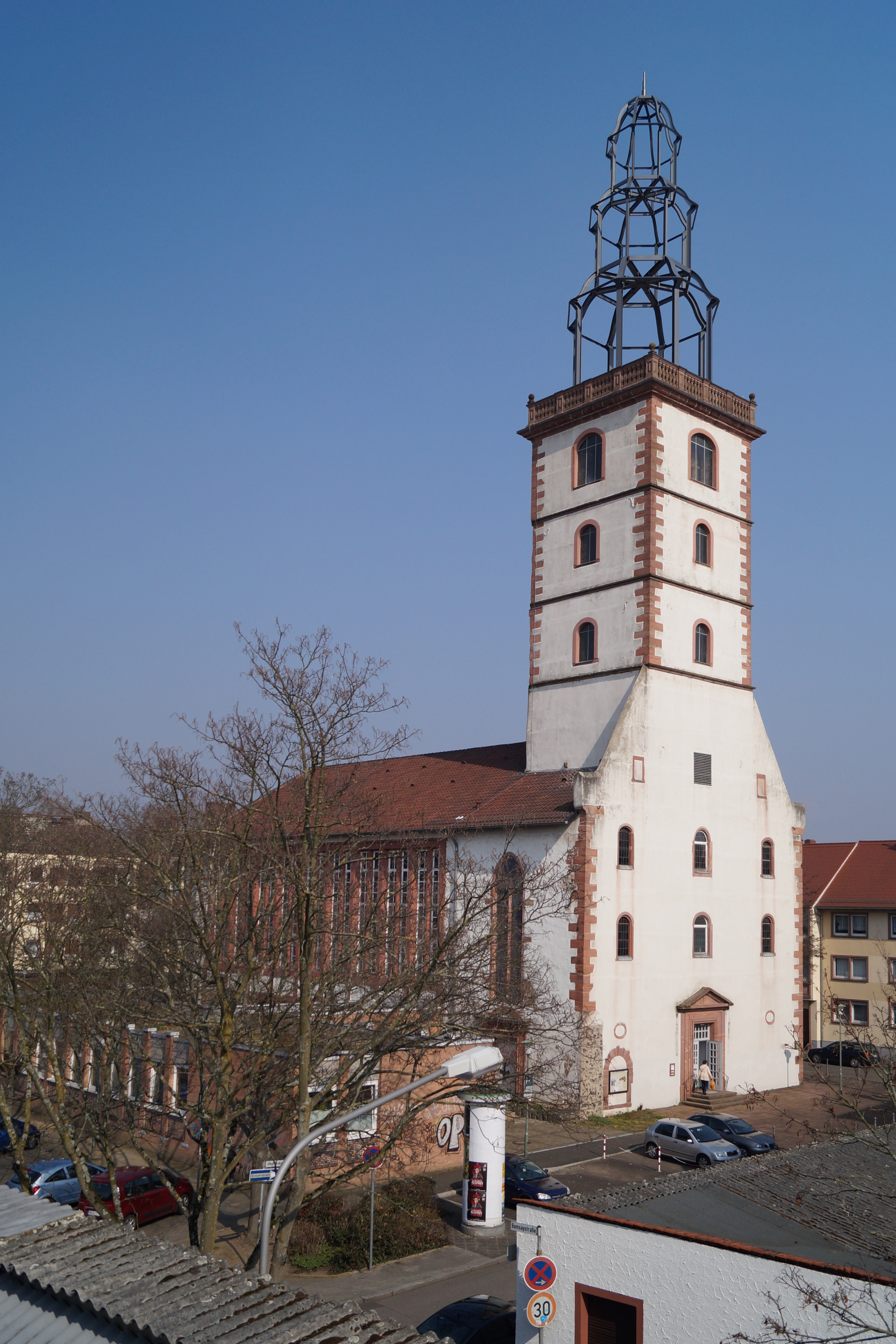 Johanneskirche in Hanau, Ansicht von SW.